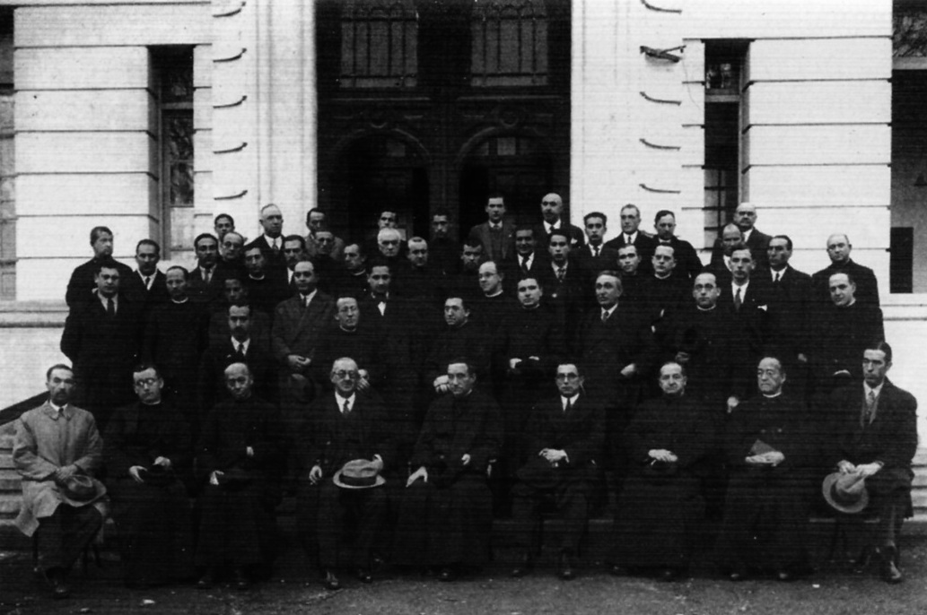 Colexio Xesuíta Apóstolo Santiago de Teis. Están Xosé Manuel Cábada Vázquez e Xesús Ferro Couselo entre outros.